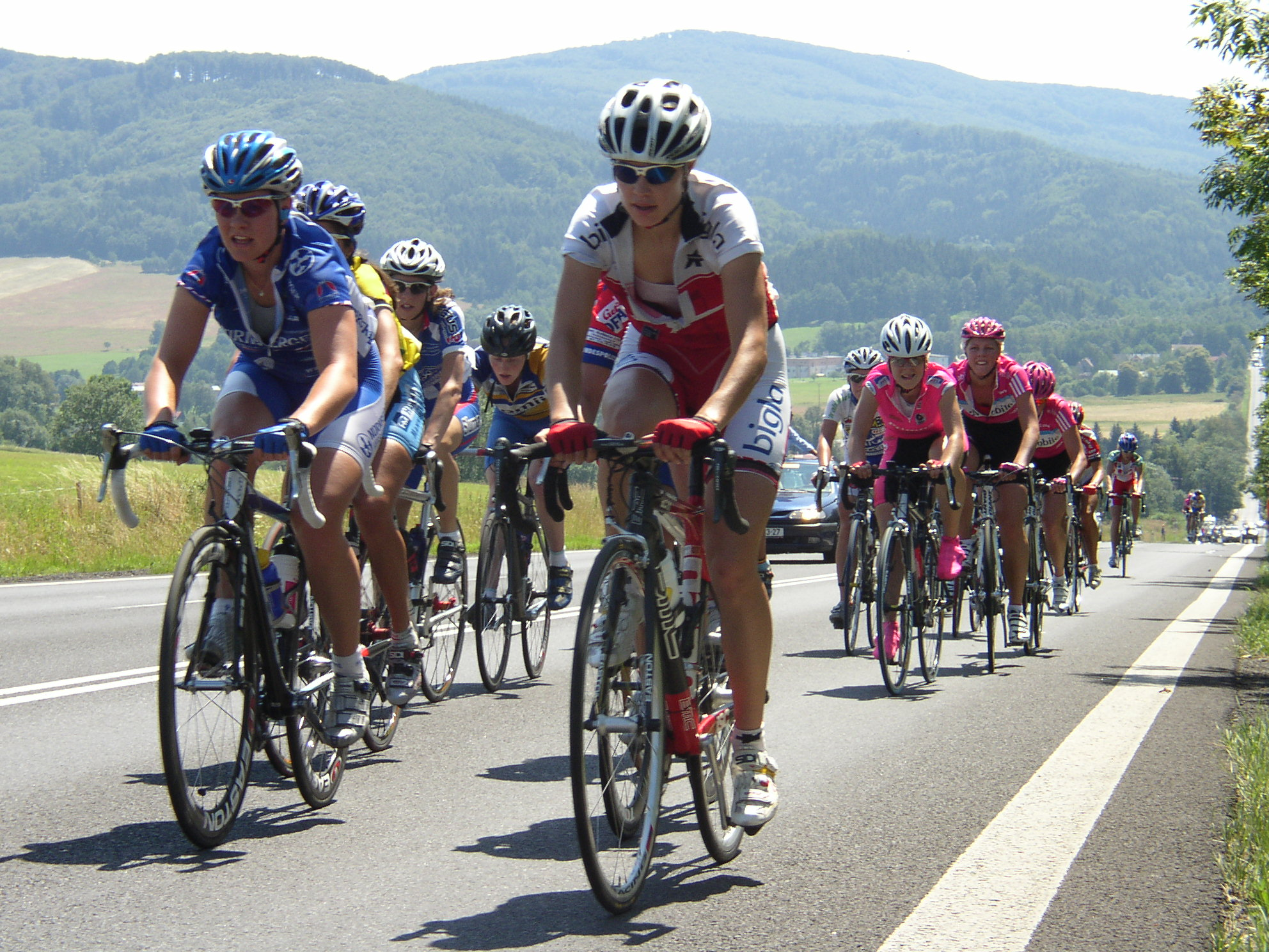 Tour de Feminin,5.etapa, poblíž obce Dolní Podluží, okres Děčín, Česká republika